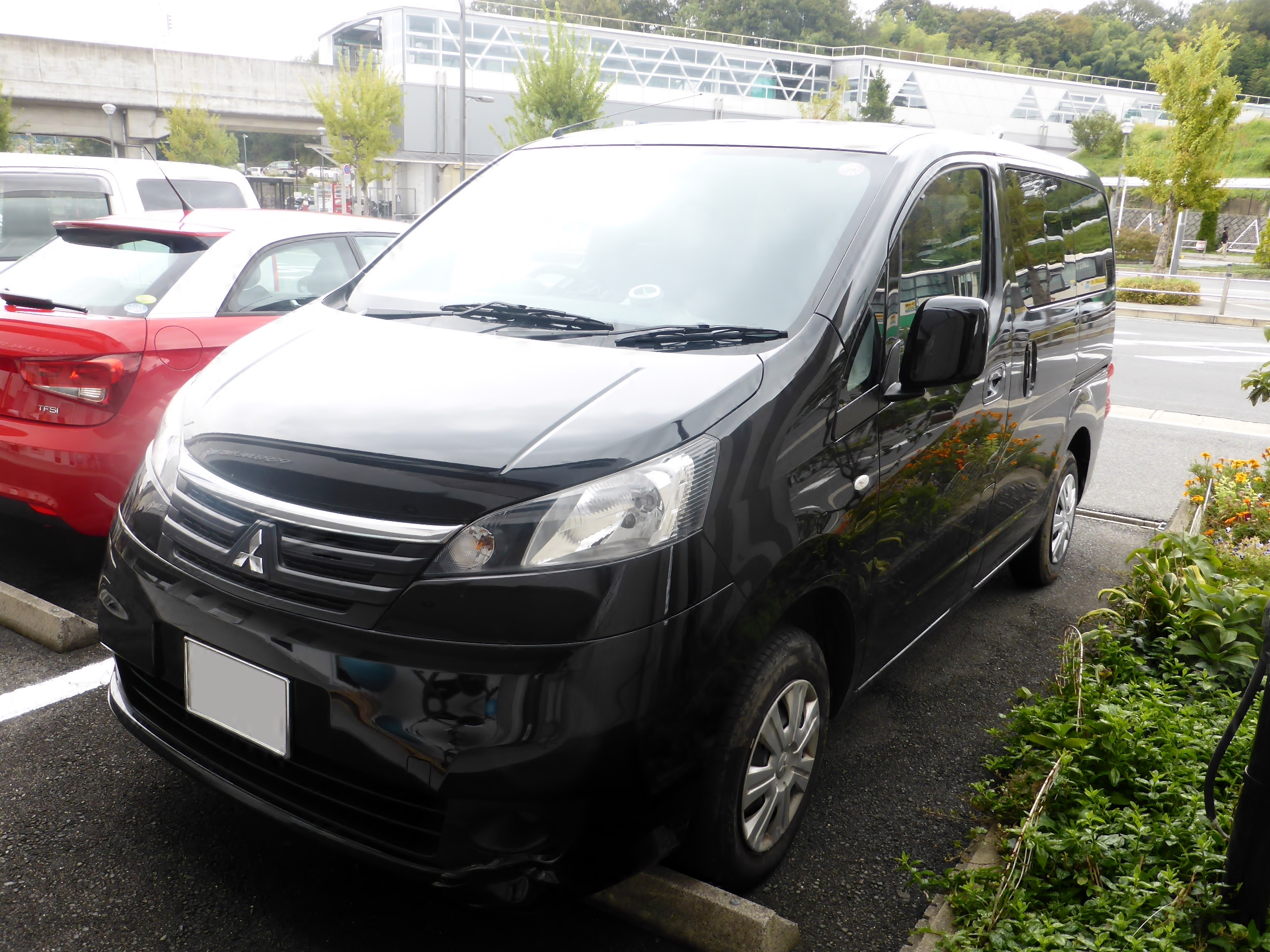 BM20型三菱・デリカD:3をフロントから撮影。